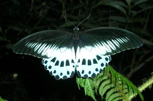 Papilio polymnestor, Blue Mormon Wynaad